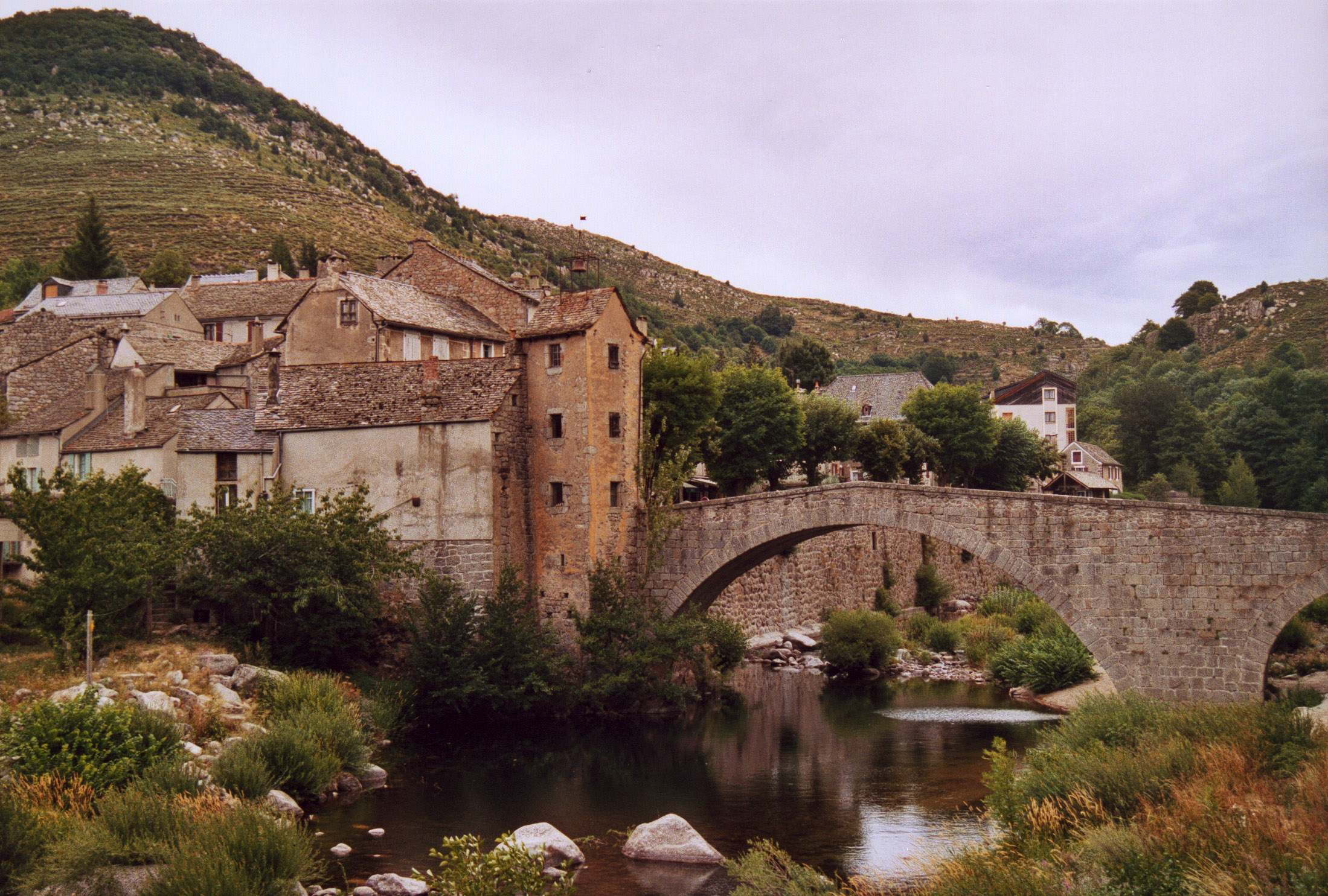 France Lozère Le Pont-de-Montvert Photographie prise par GIRAUD Patrick Août 2005